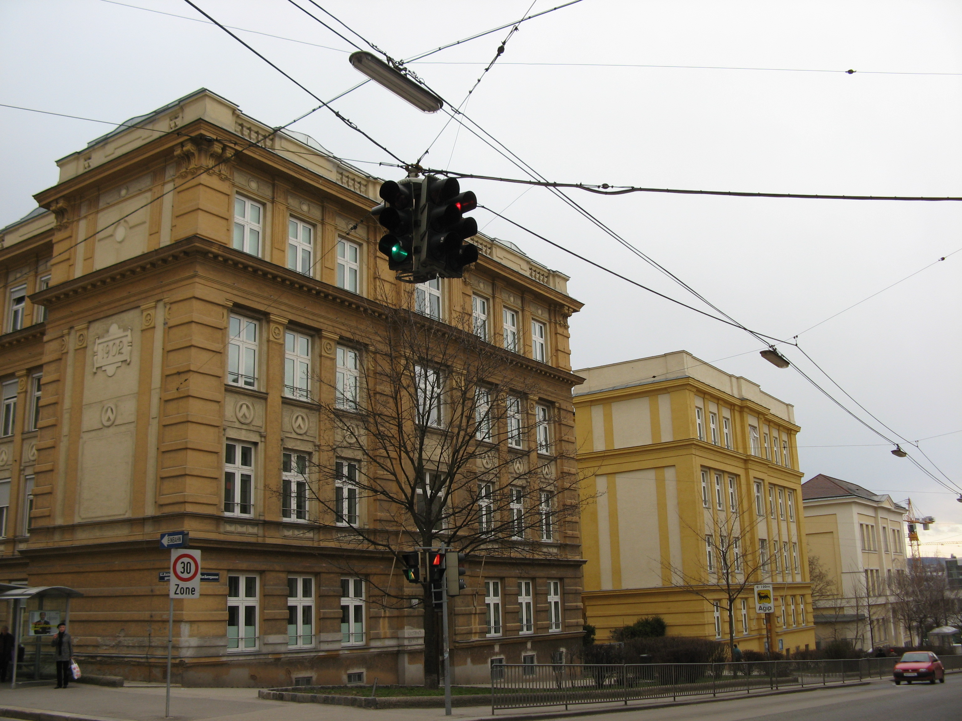 Schule (1901/02), Ruckergasse 44, Wien-Meidling